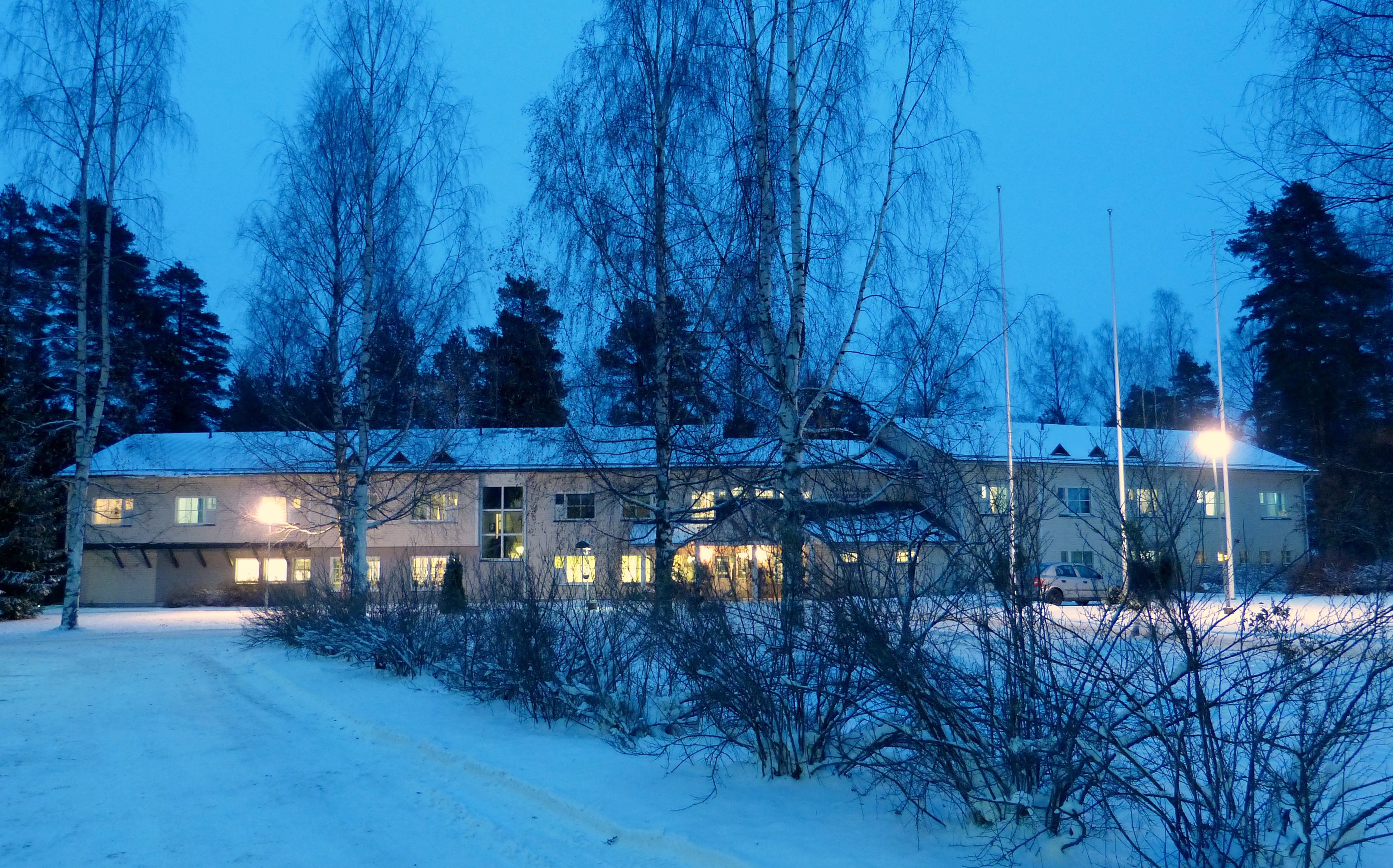 Itä-Karjalan kansanopiston uusi päärakennus (1990) 15.11.2016